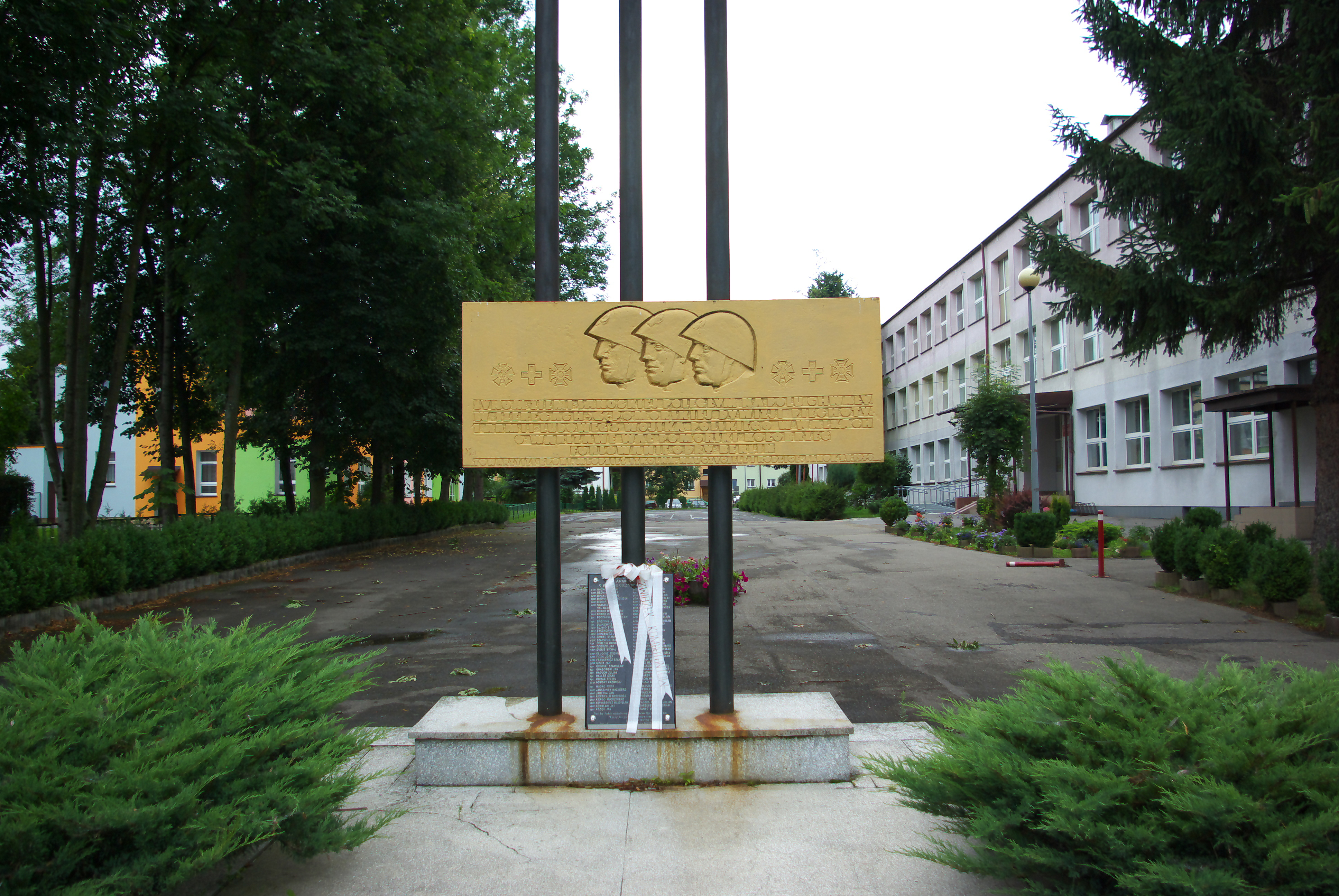 Pomnik upamiętniający żołnierzy 6 Pomorskiej Dywizji Piechoty 1 Armii Ludowego Wojska Polskiego przy ulicy Jana Pawła II w Sanoku